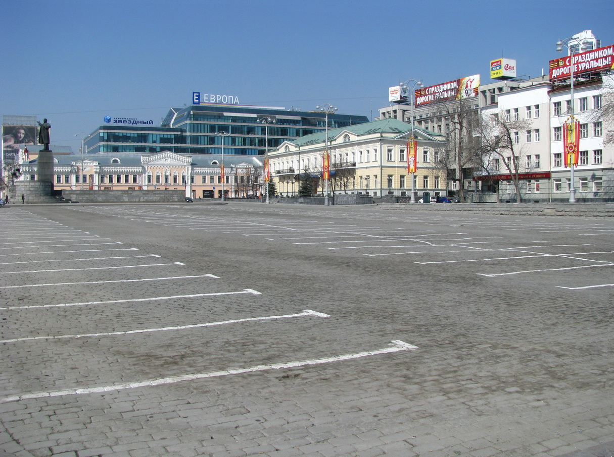 Площадь 1905 года - главная площадь Екатеринбурга